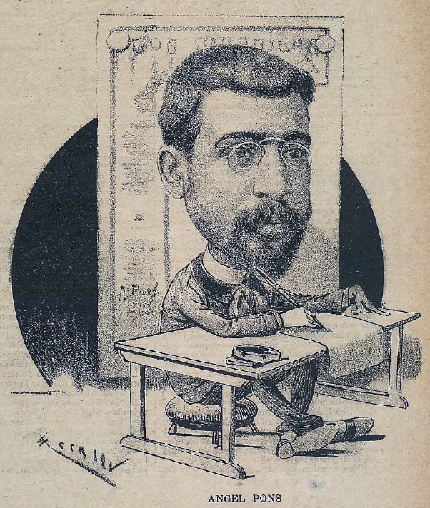 Ángel Pons.